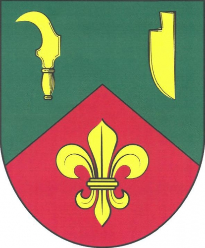 znak, Kubšice, okres Znojmo